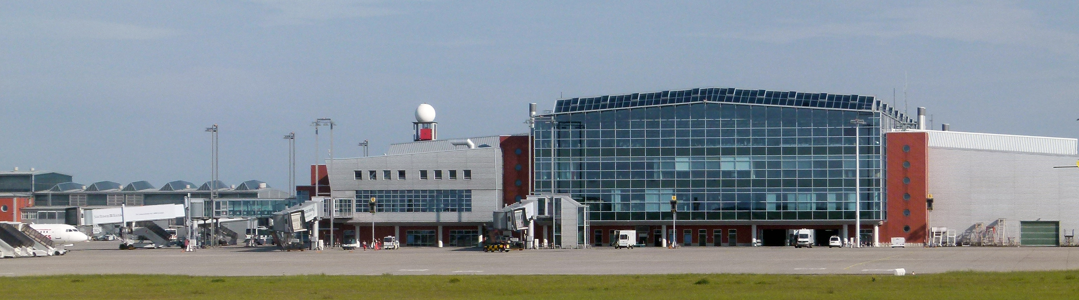 Flughafen Dresden - Blick auf das Terminalgebäude von Innen